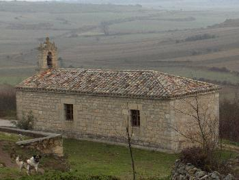 ErmitaDoloresCitoresParamo